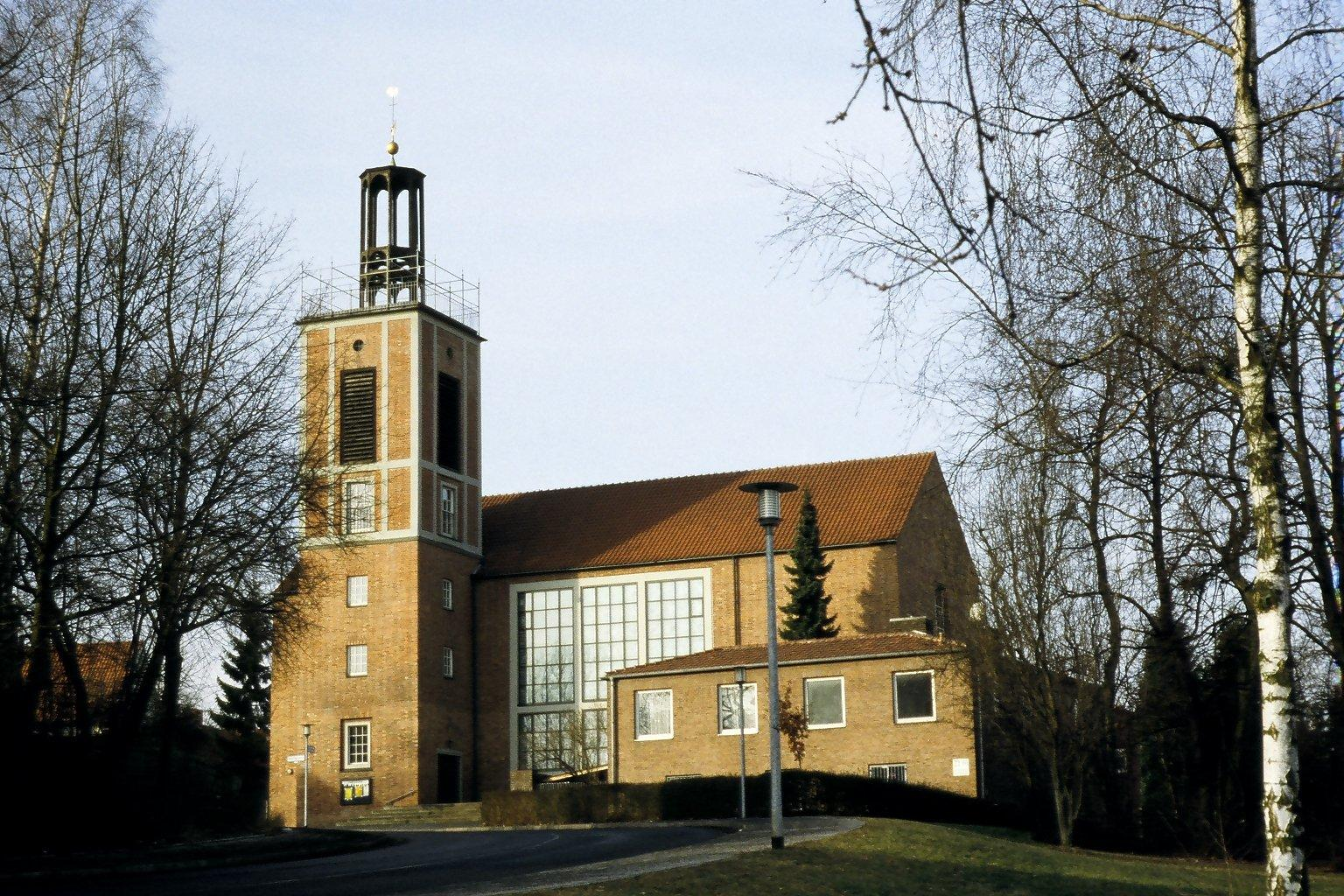 Ev.-luth. Christuskirche in Göttingen, Egelsberg, Friedrich-Naumann-Str. 66, Architekt: Diez Brandi